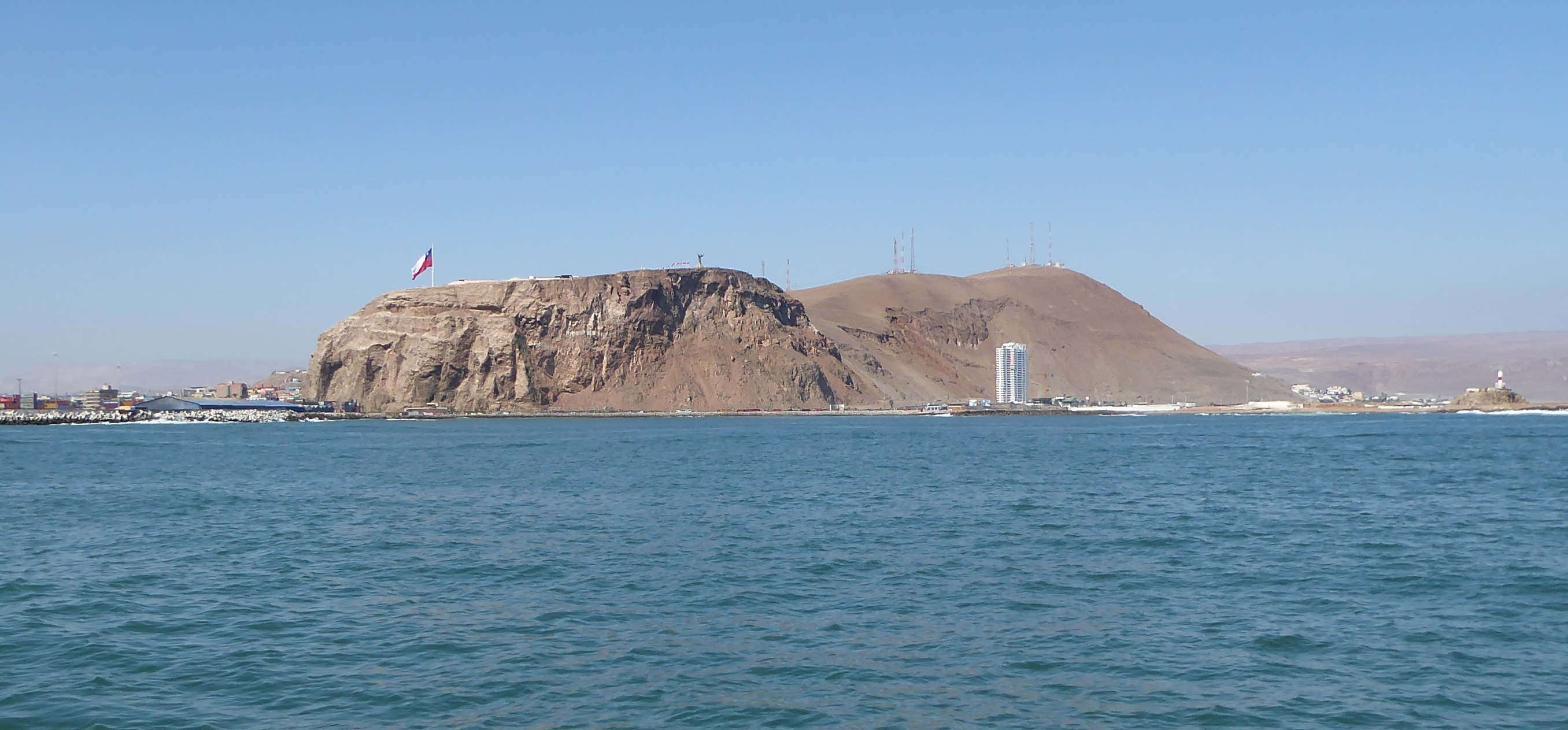 Arica pelagic trip, Chile